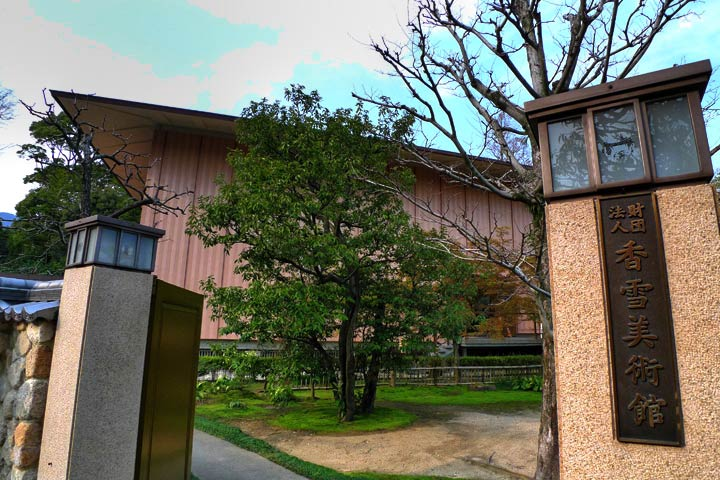 Kosetsu Museum：香雪美術館